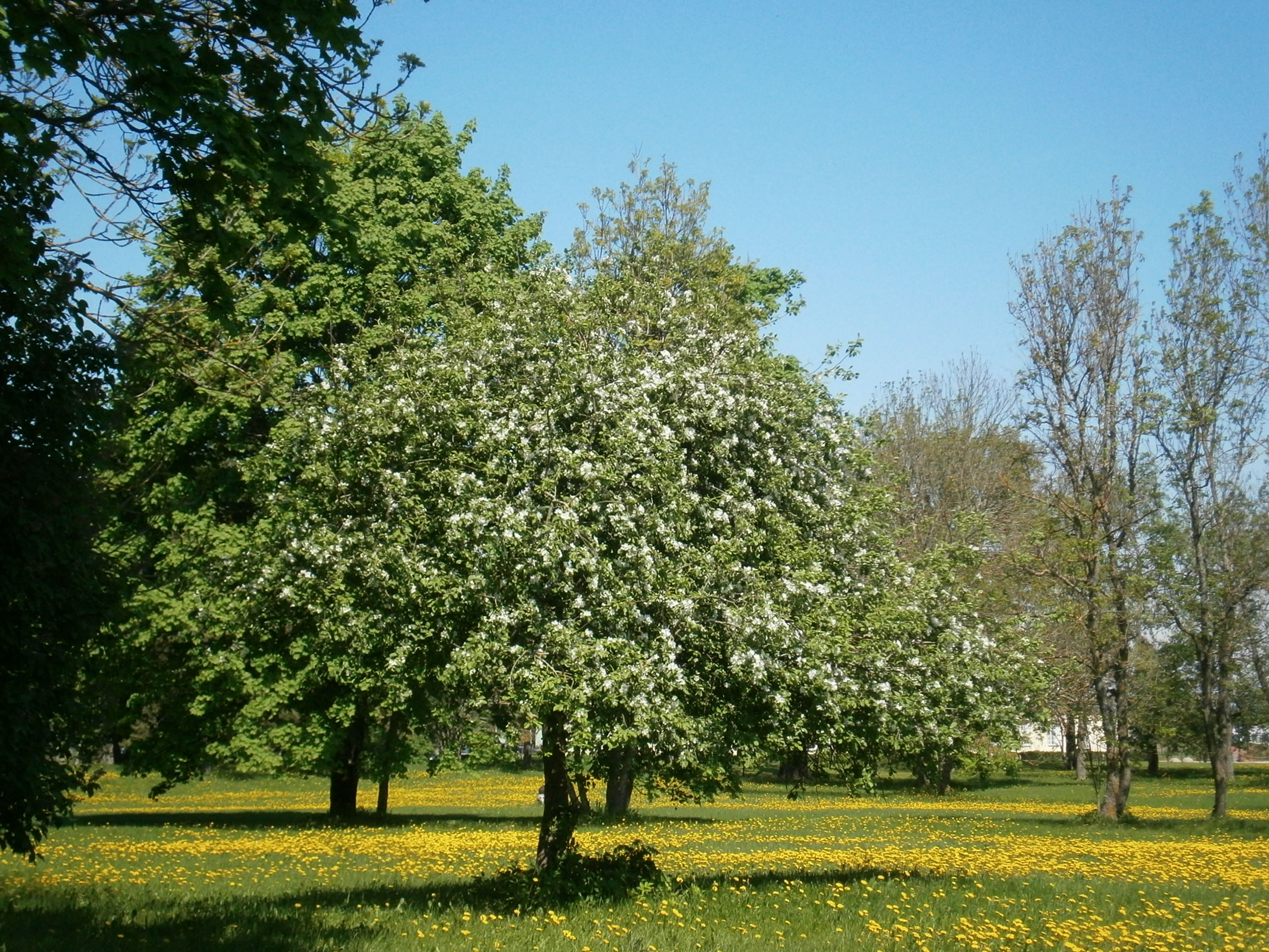 Uuemõisa mõisa park. Läänemaa, Ridala vald, Uuemõisa, Tallinna maantee.